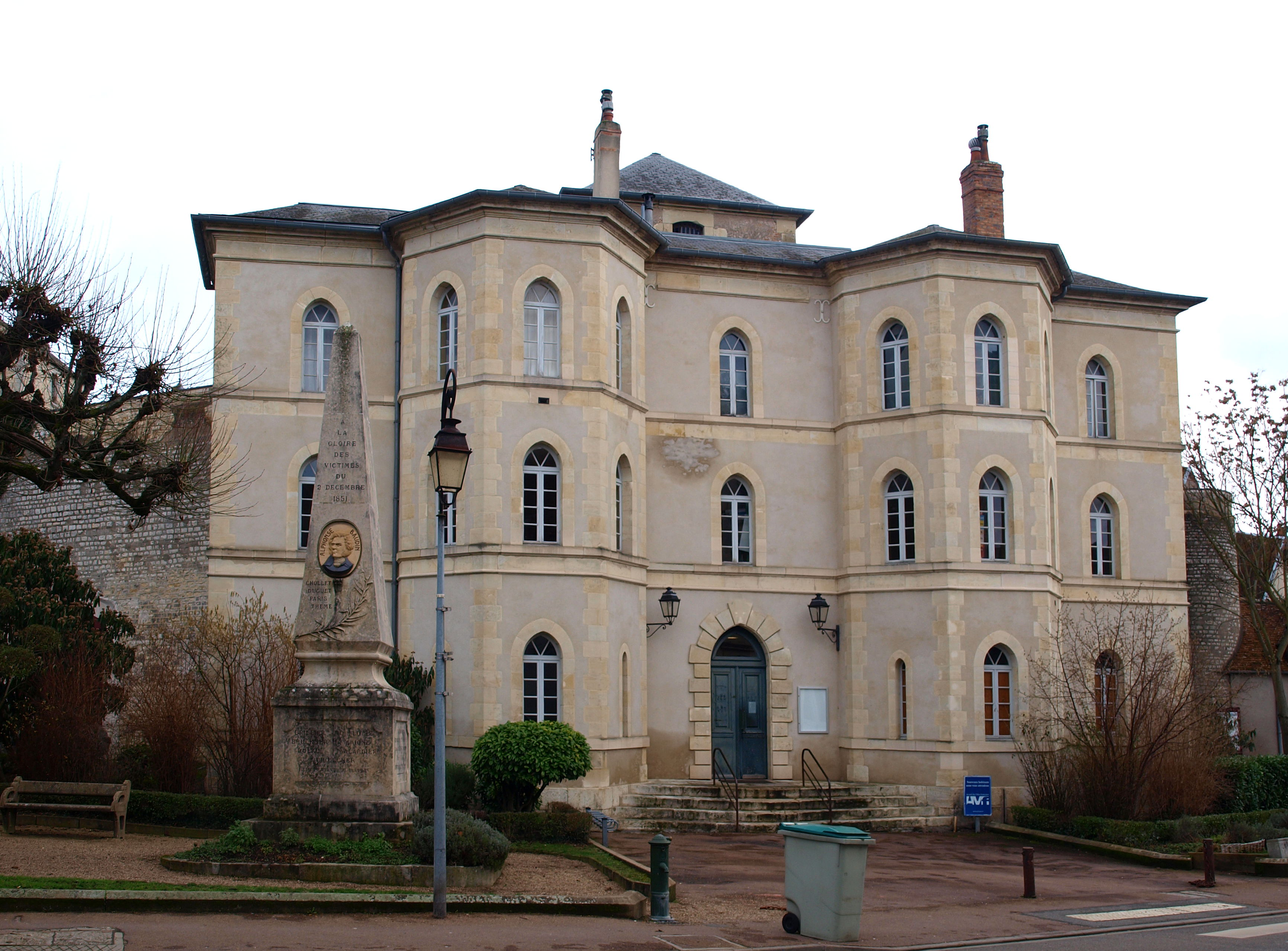 Cosne-Cours-sur-Loire (Nièvre, France) ; la bâtisse de l'ancienne caserne des pompiers.